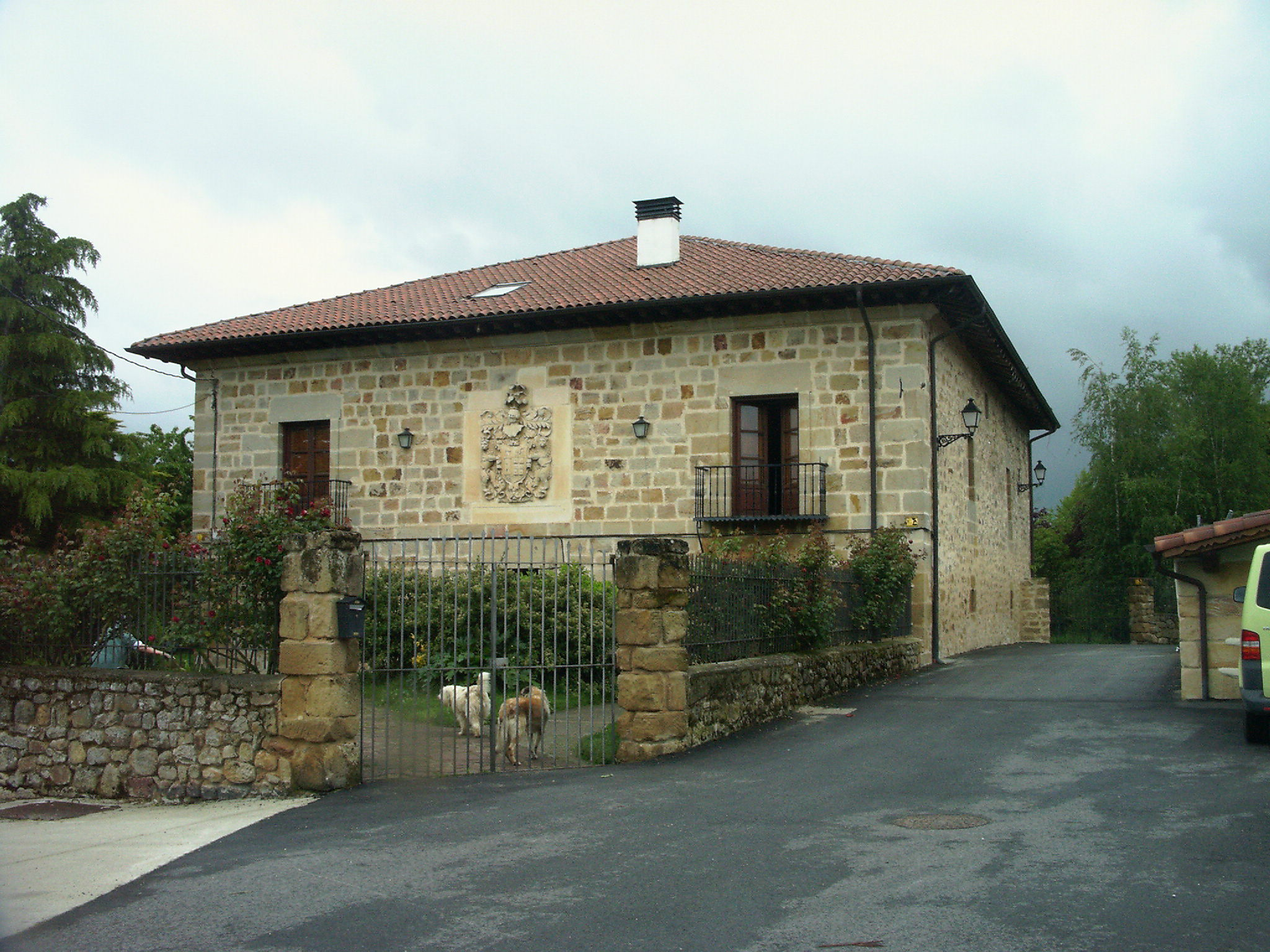 Zalduondoko Andoin-Luzuriaga Jauregia